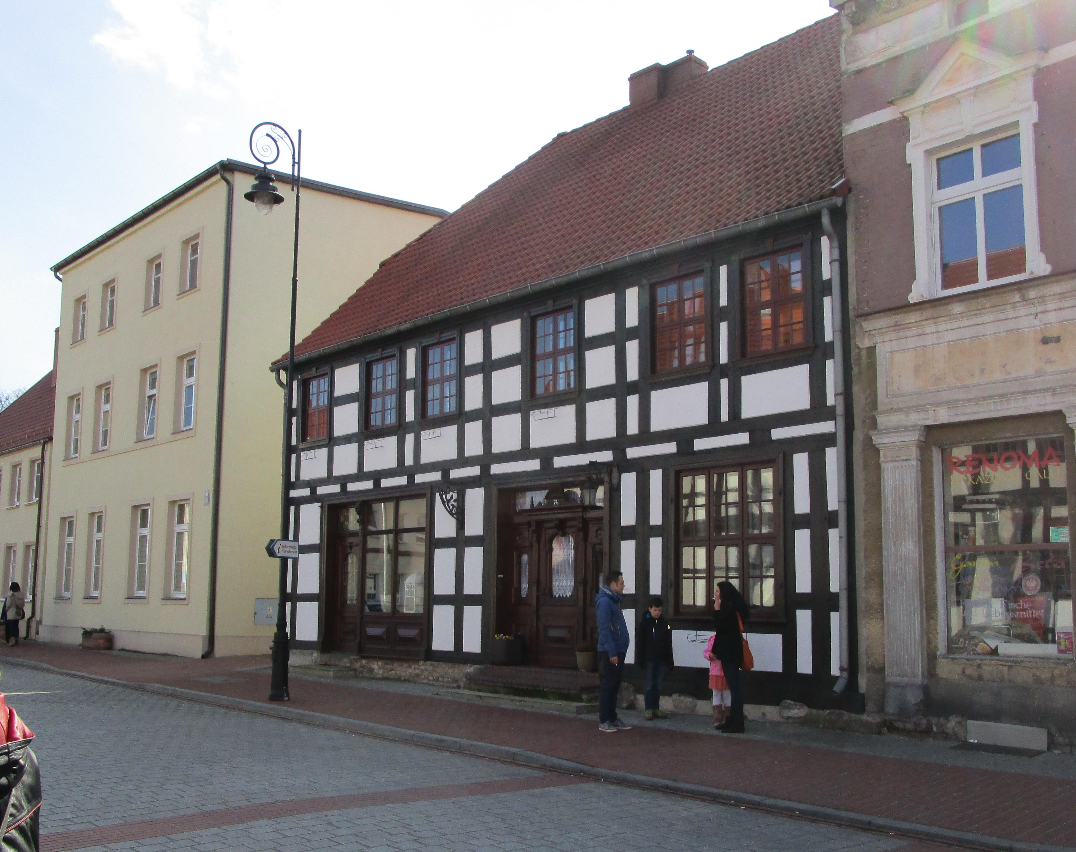 Rekonstruiertes Fachwerkhaus am Rathaus